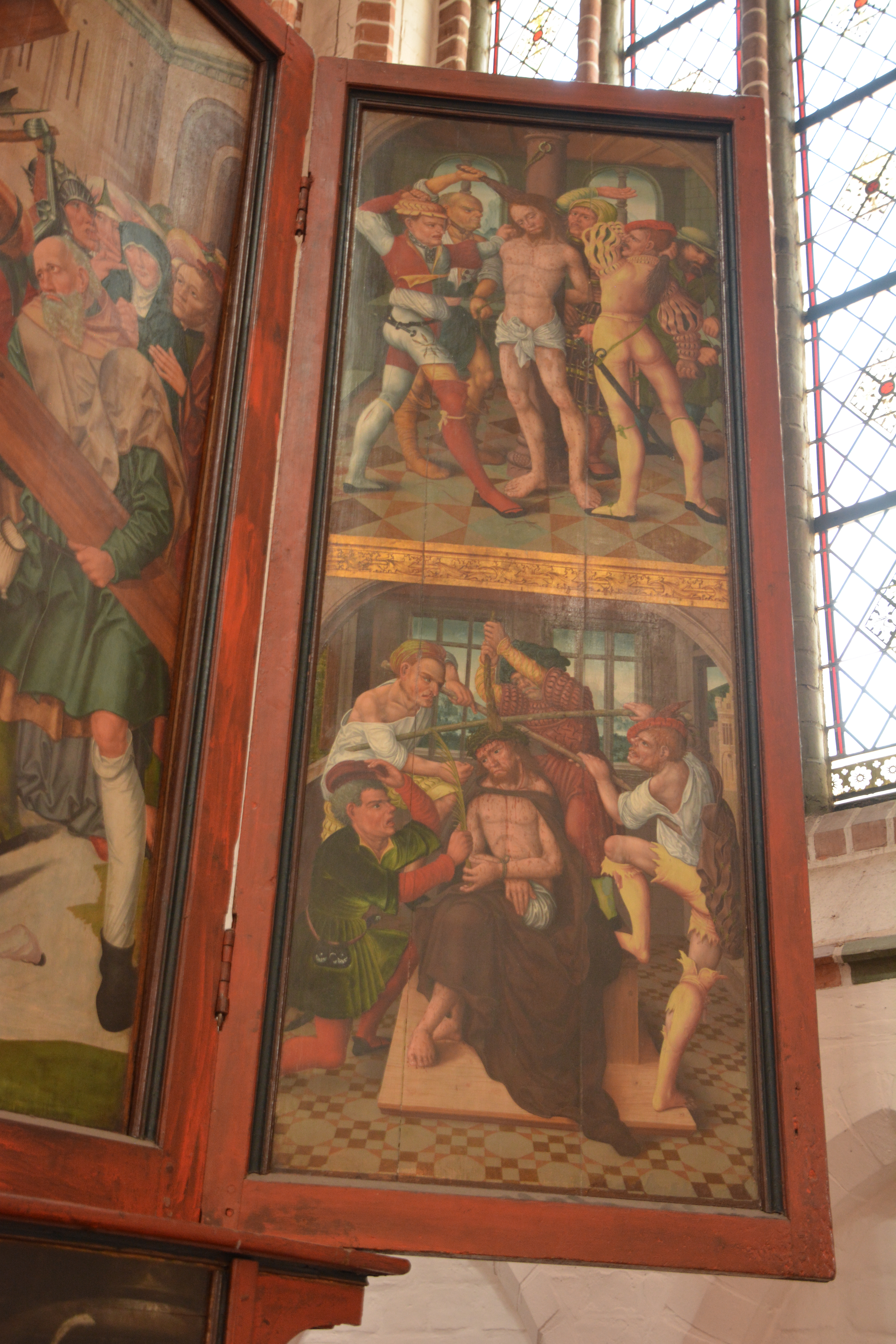 Seitenflügel Halenpaghe-Altar St. Petri Buxtehude